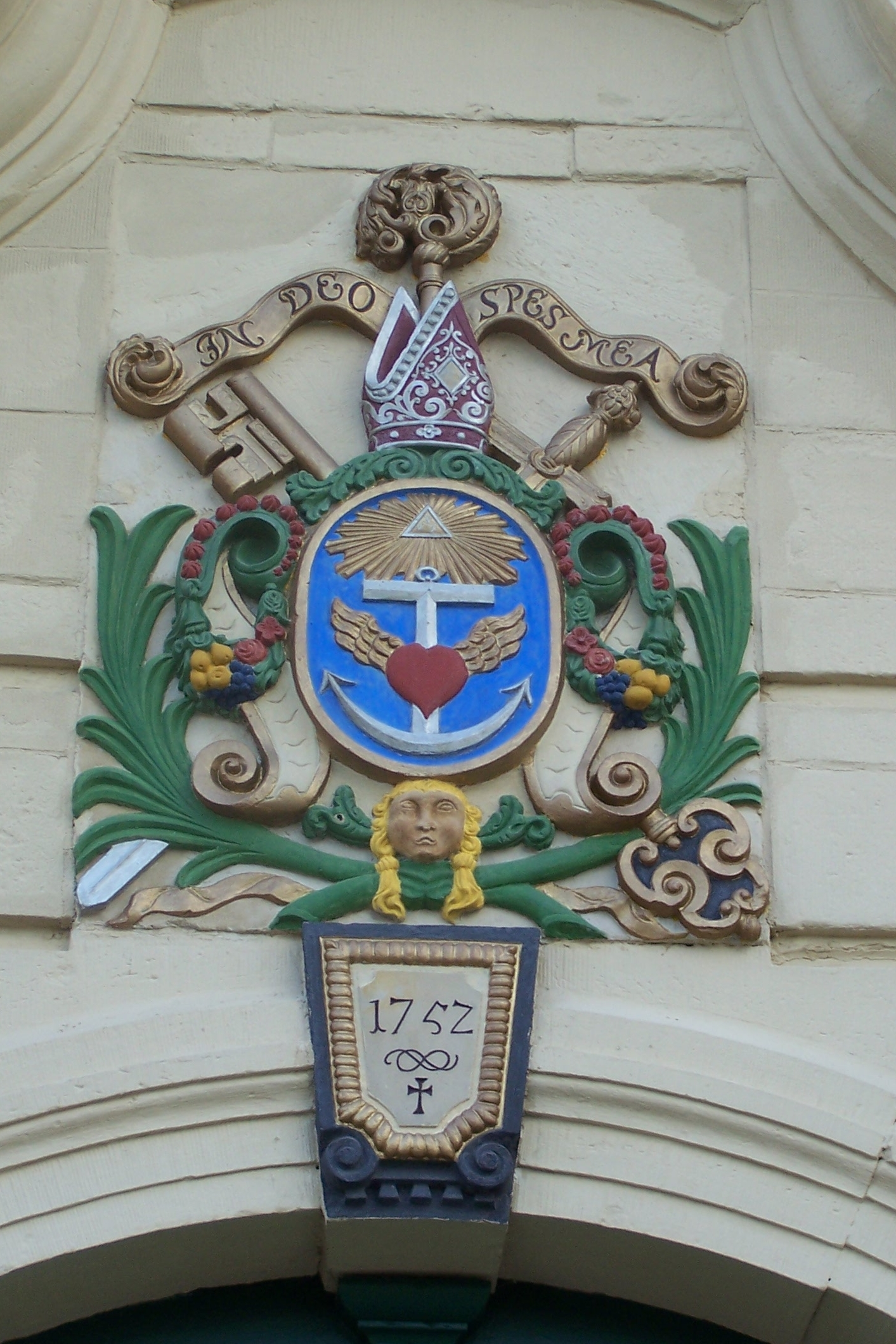 Ansichten und Details zum Schloss Bischofroda im Wartburgkreis.